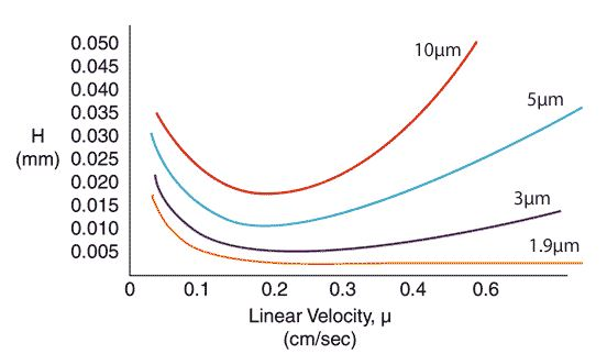 Efeito do tamanho da partícula x eficiência